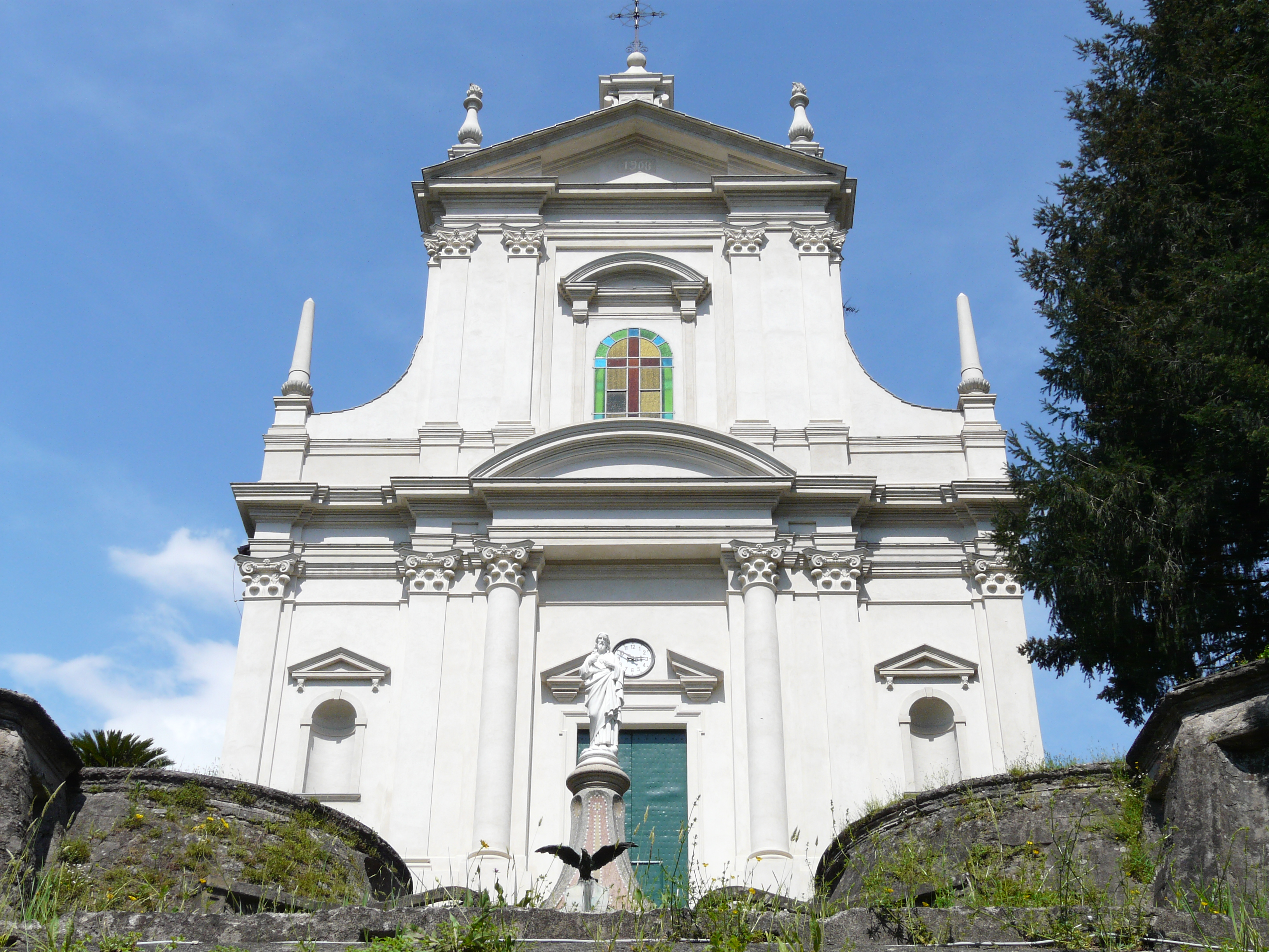 Chiesa del Sacro Cuore, Moconesi, Liguria, Italia